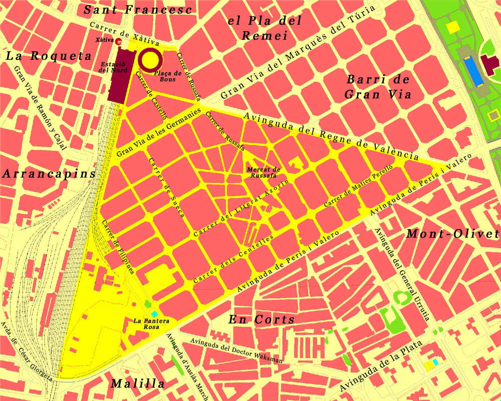 Plànol del barri de Russafa, al districte de l'Eixample de València